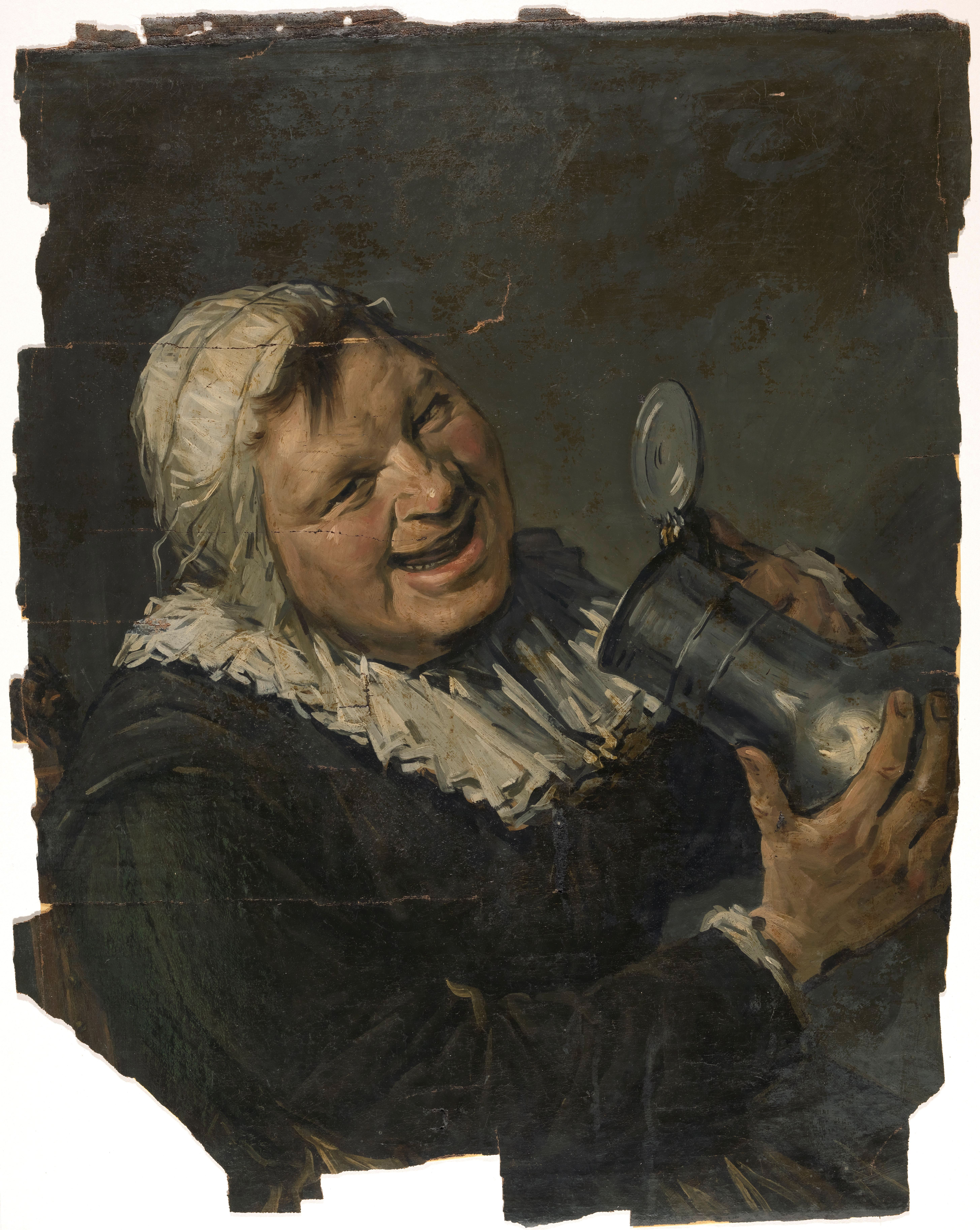 Malle Babbe. Een lachende oude vrouw brengt een kan naar de mond. Geschilderd in de trant van Frans Hals.